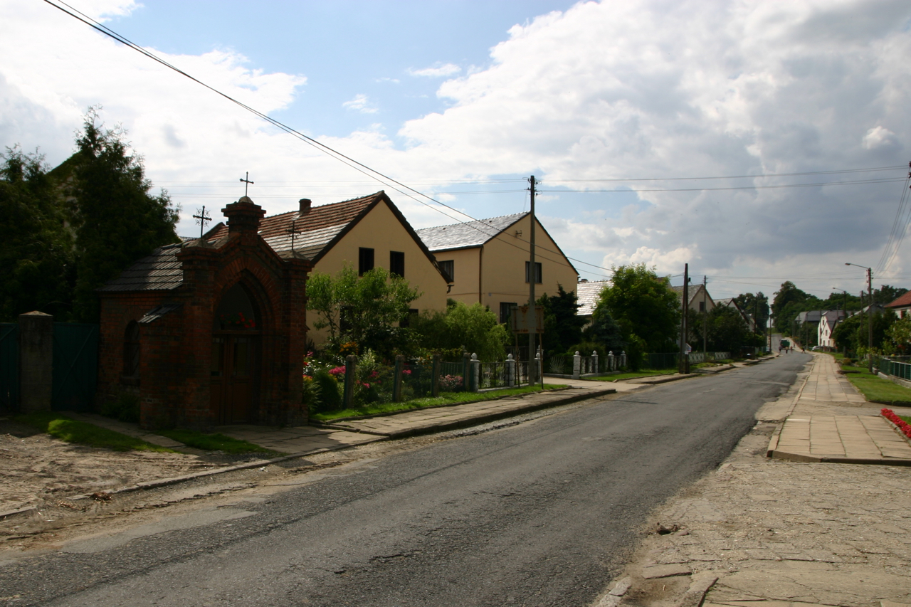 Śmicz (dodatkowa nazwa w j. niem. Schmitsch) – wieś w Polsce położona w województwie opolskim, w powiecie prudnickim, w gminie Biała.